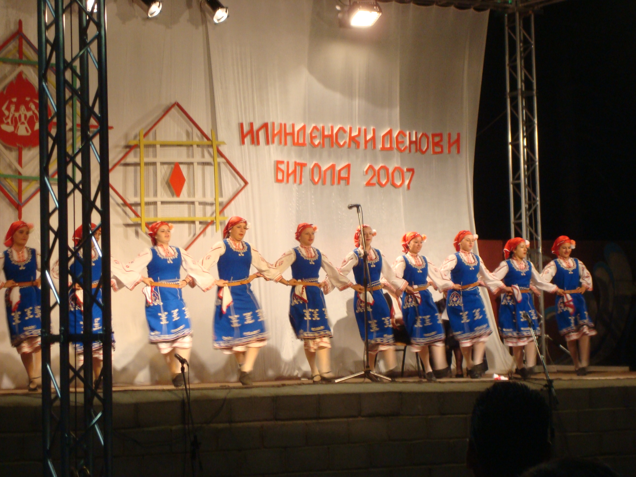 Илиндански дани 2007.КУД Самоков,Бугарска.